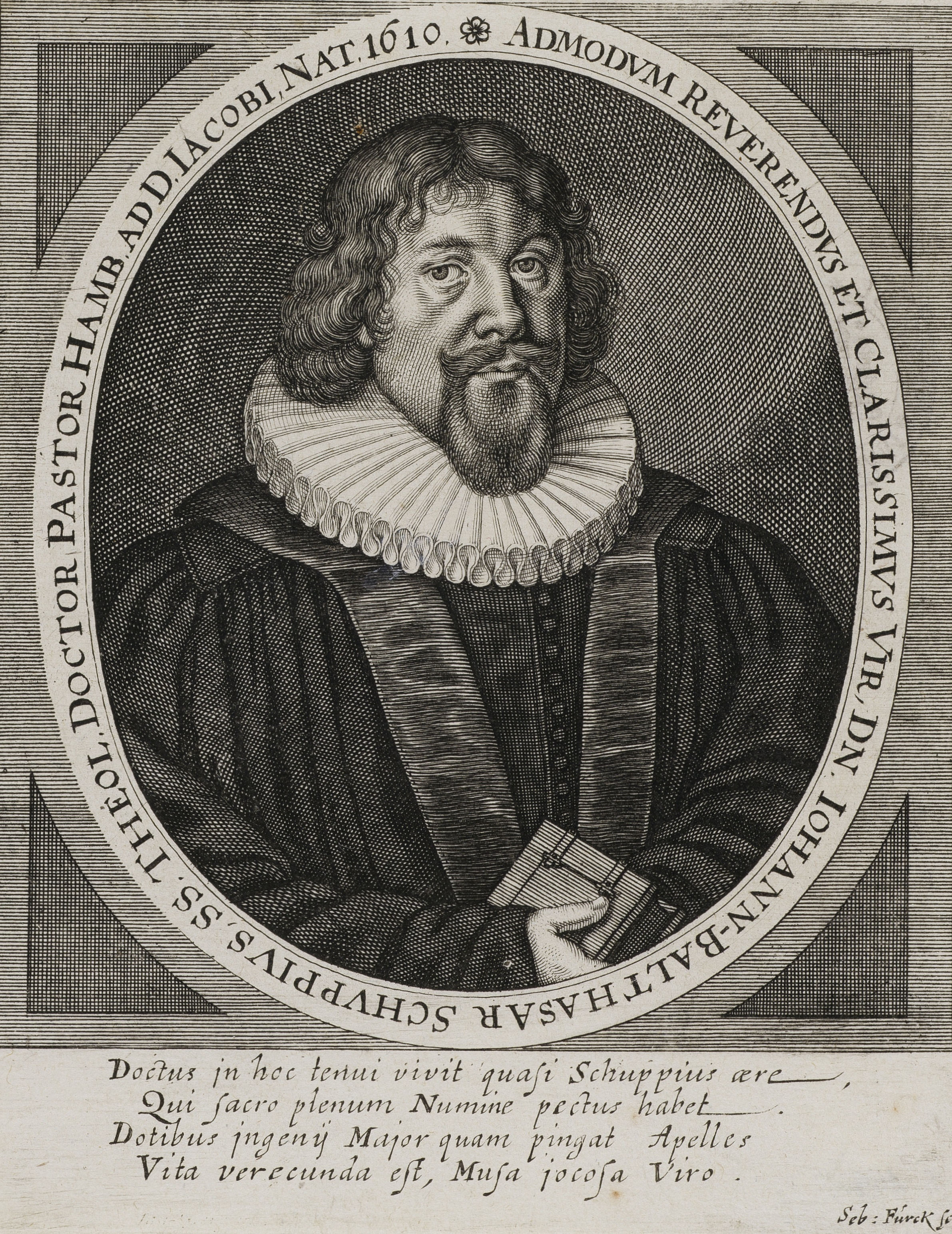 Bildnis von Johann Balthasar Schupp